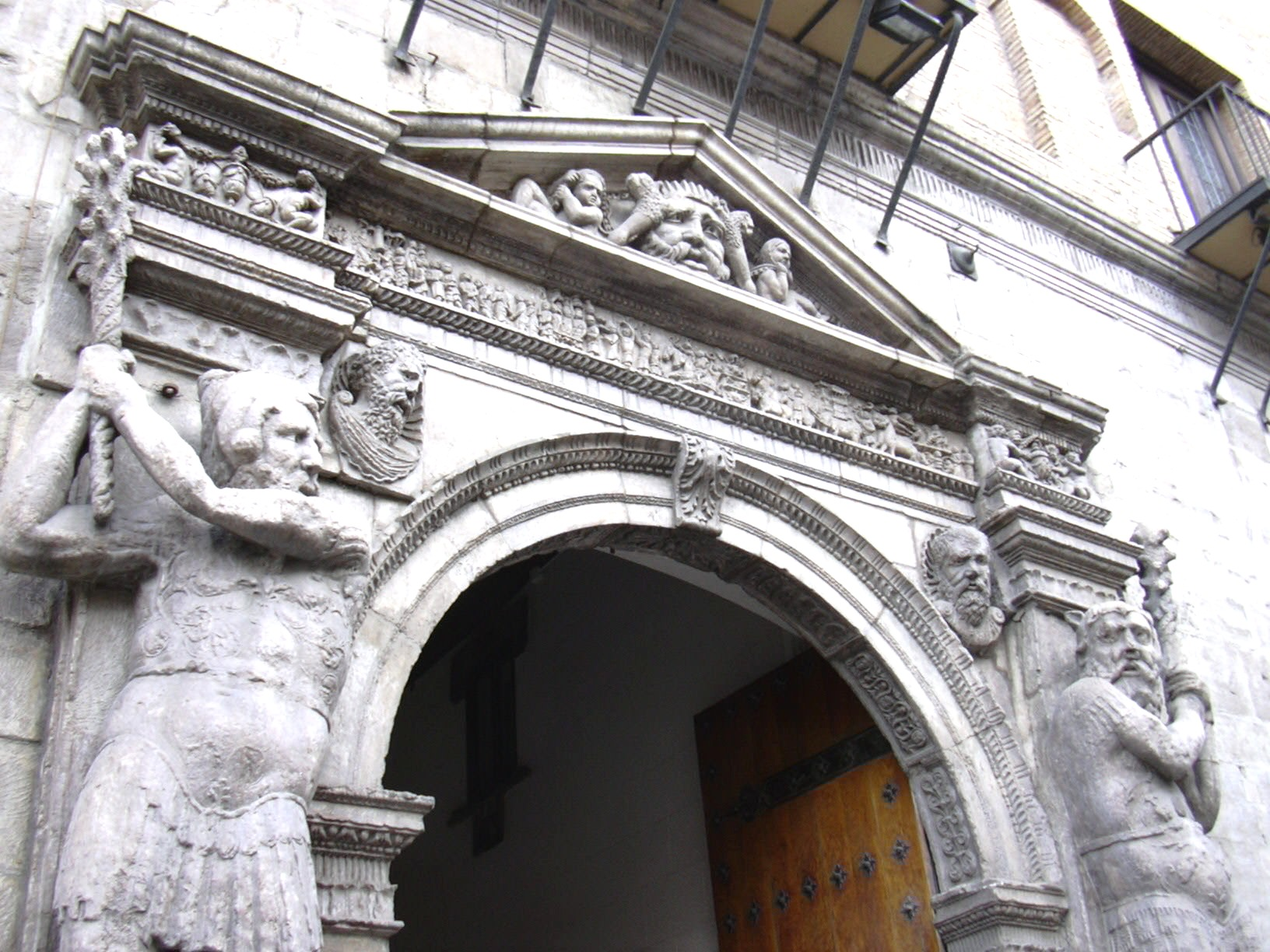 Zaragoza - Palacio de los Luna o de los Condes de Morata - Tribunal Superior de Justicia de Aragón - Dintel de la puerta de entrada - siglo XVI.